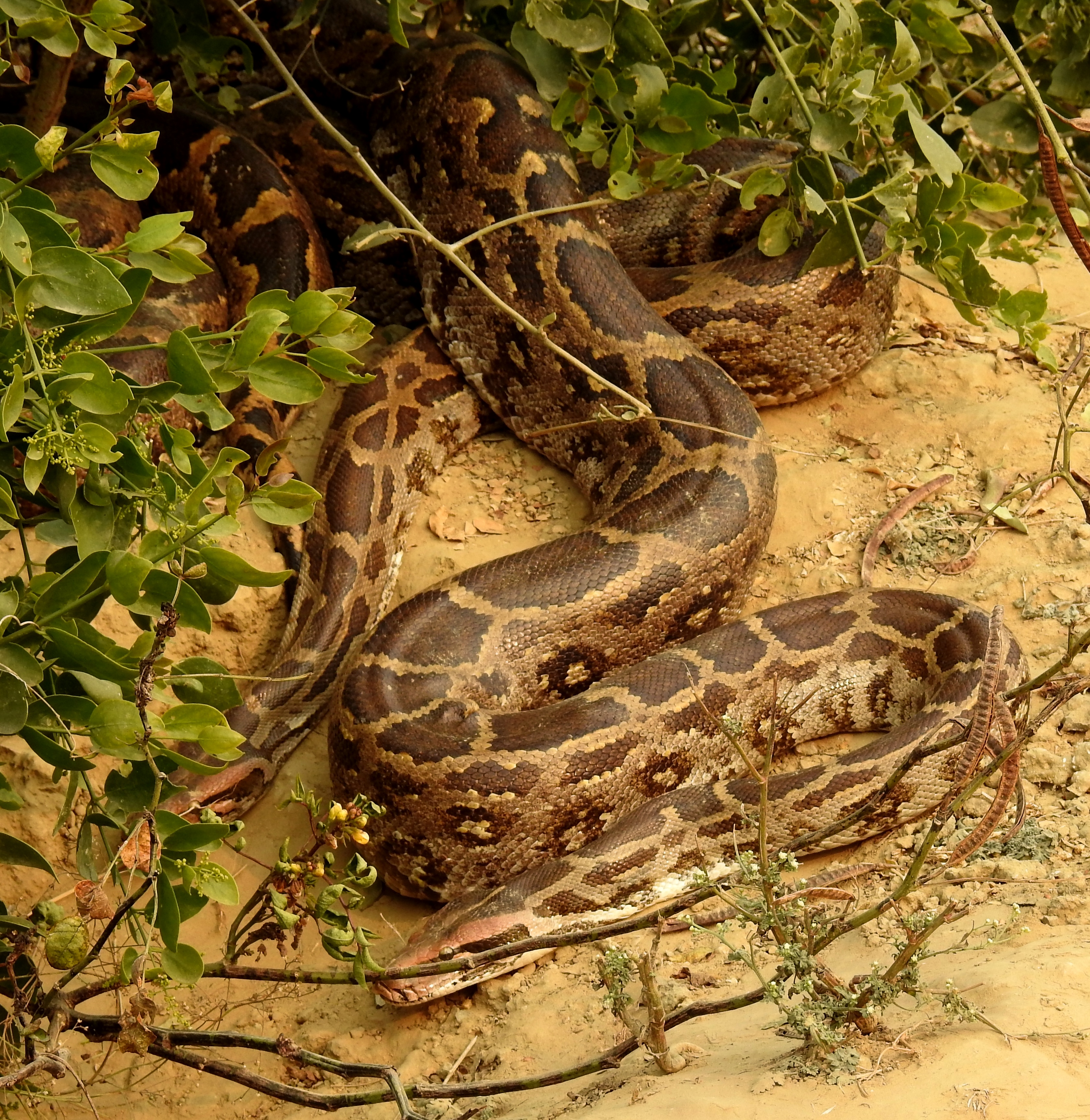 मराठी नाव: अजगर